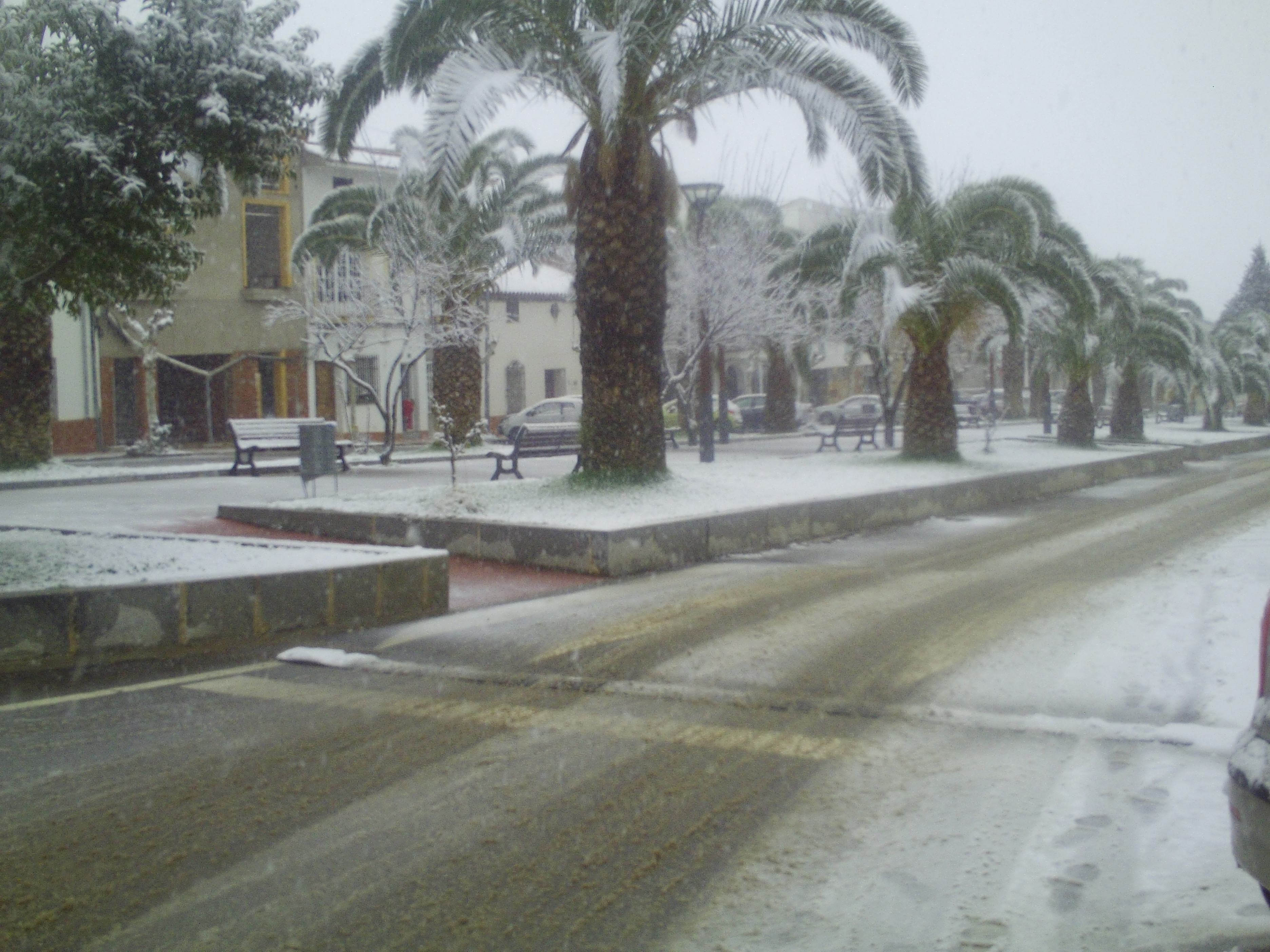 Nieve en Herrera del Duque, rareza que ocurre cada 3 o 4 años.